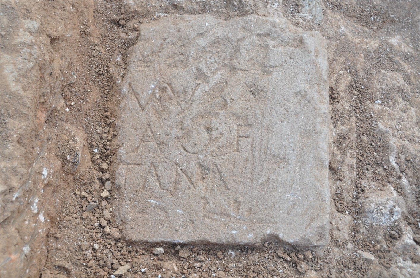 Làpida epigrafiada recuperada als treballs de la vil·la romana del Pont del Treball Digne (Barcelona)